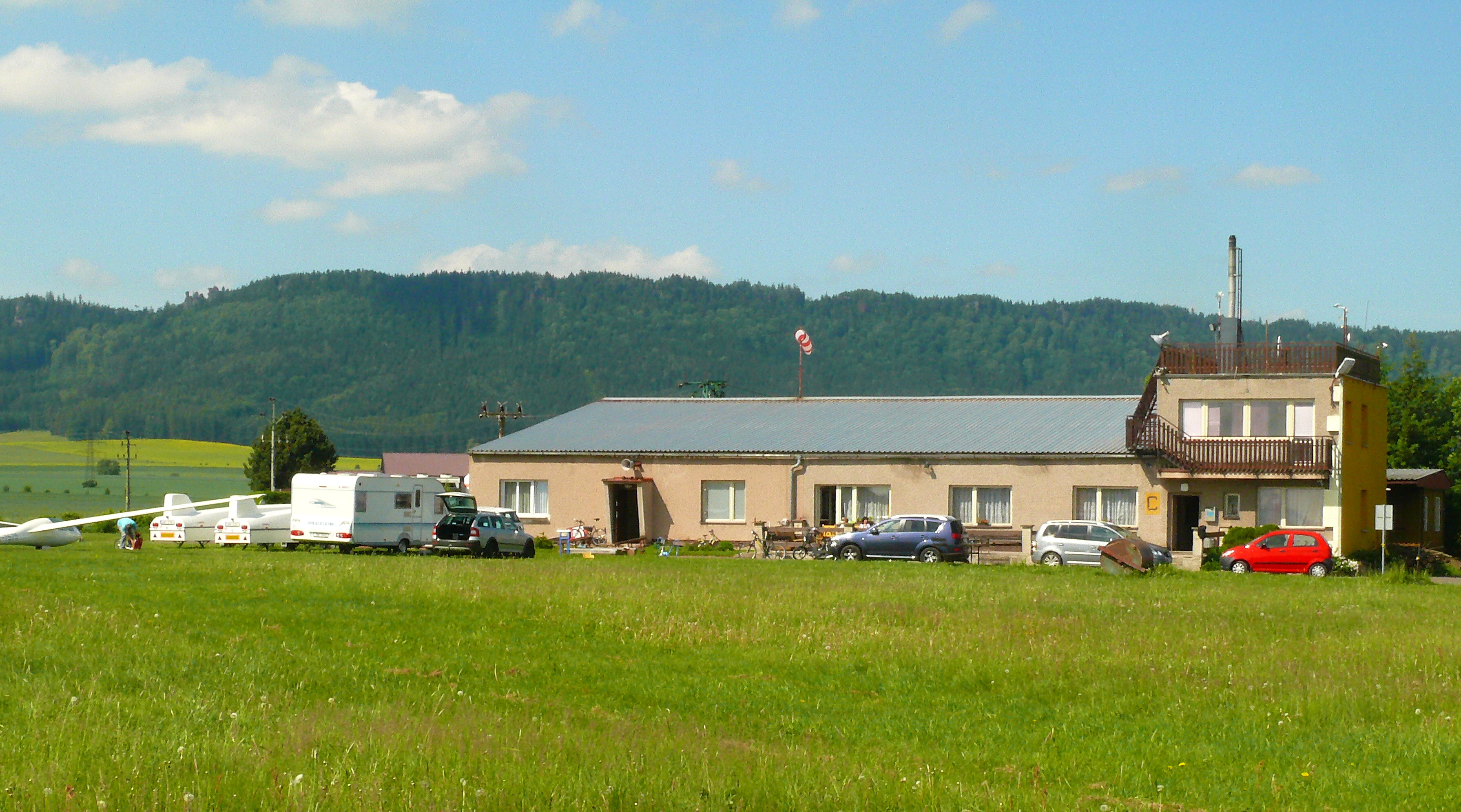 Letiště Broumov - hlavní budova pohled od vzletové dráhy